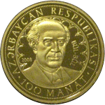 Bülbülün xatirəsinə həsr olunmuş qızıl sikkə